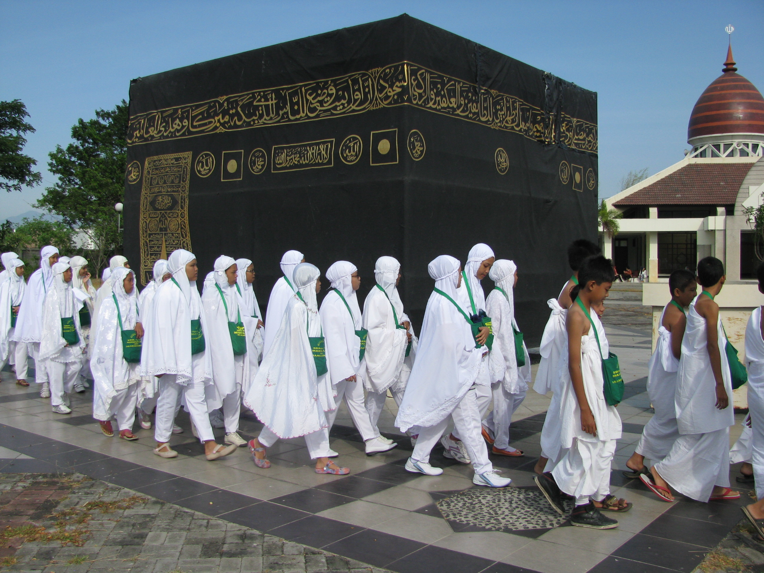 haji sebagai titik puncak ibadah